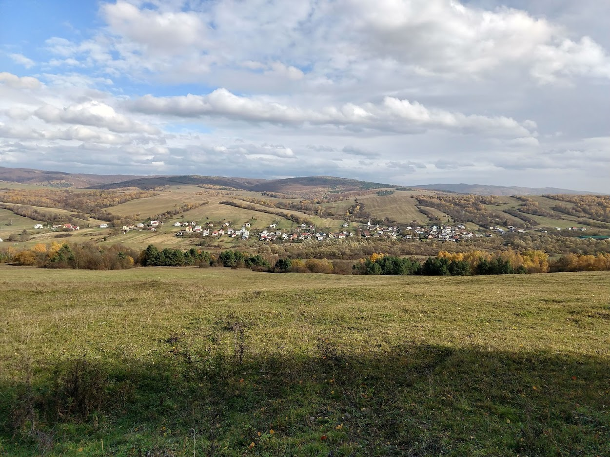 Volica